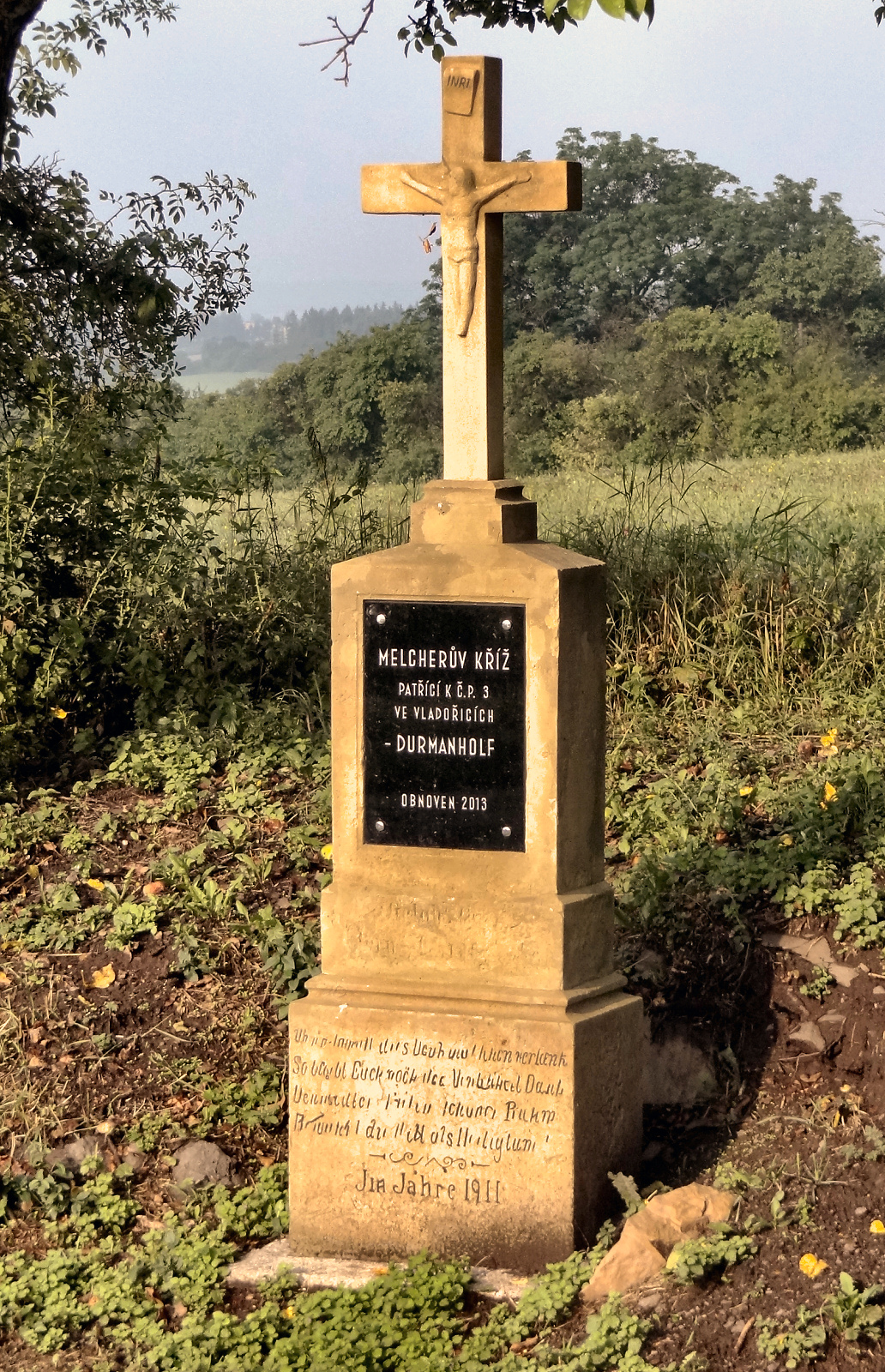 Melcherův křížek u Vladořic